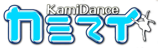 「Kamimai」番組ロゴ